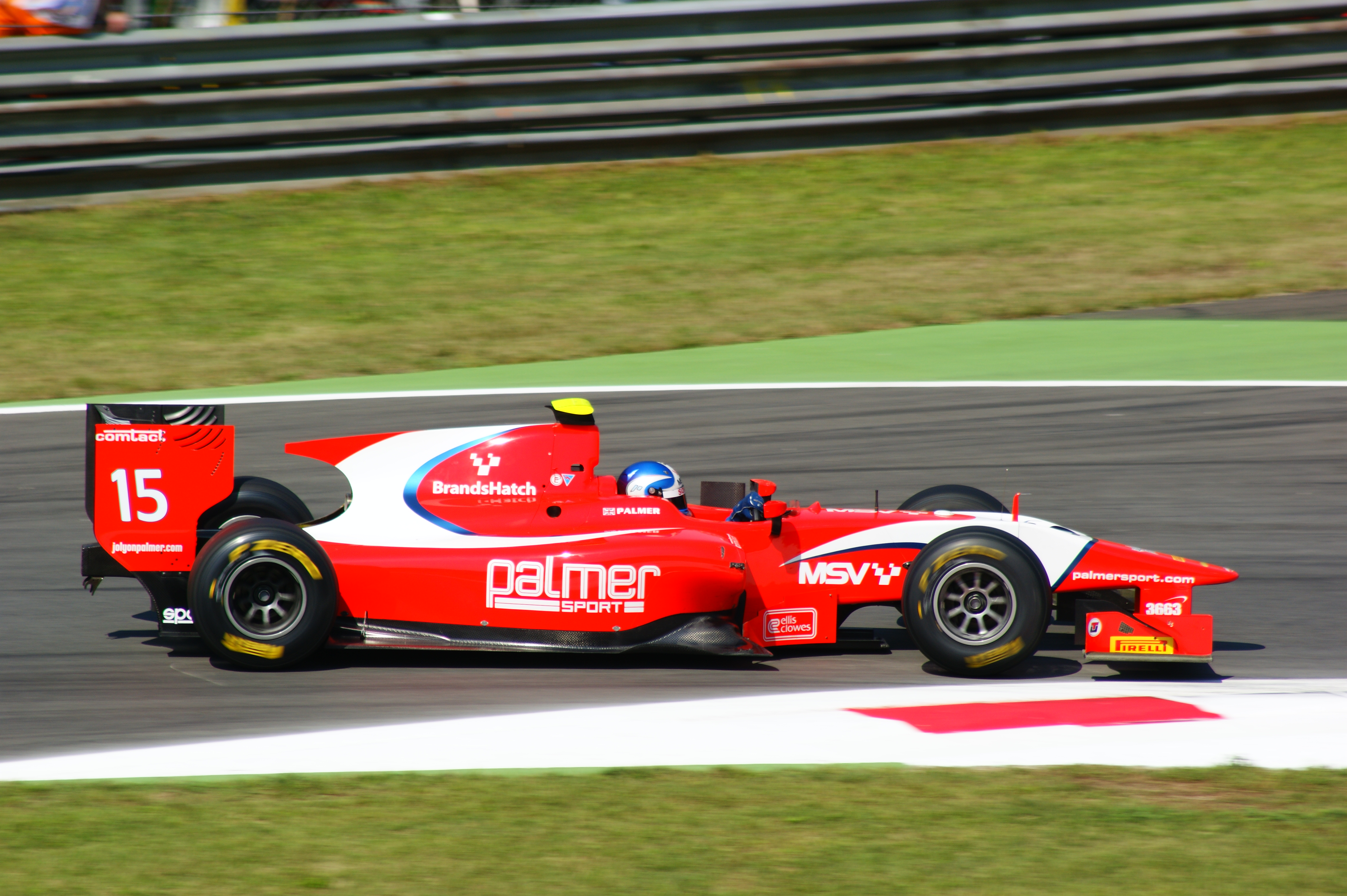 Jolyon Palmer alla prima variante Monza 2011